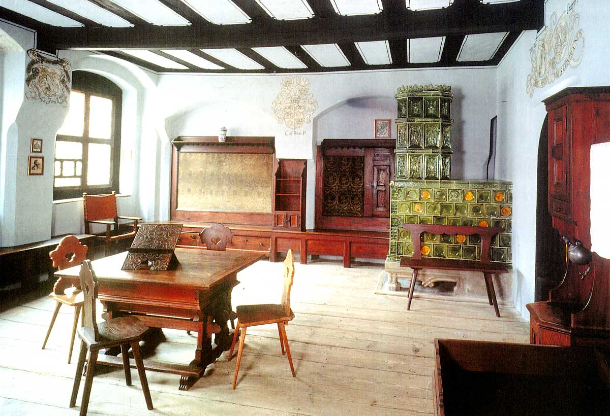 Melanchthonstube im Melanchthonhaus der Lutherstadt Wittenberg